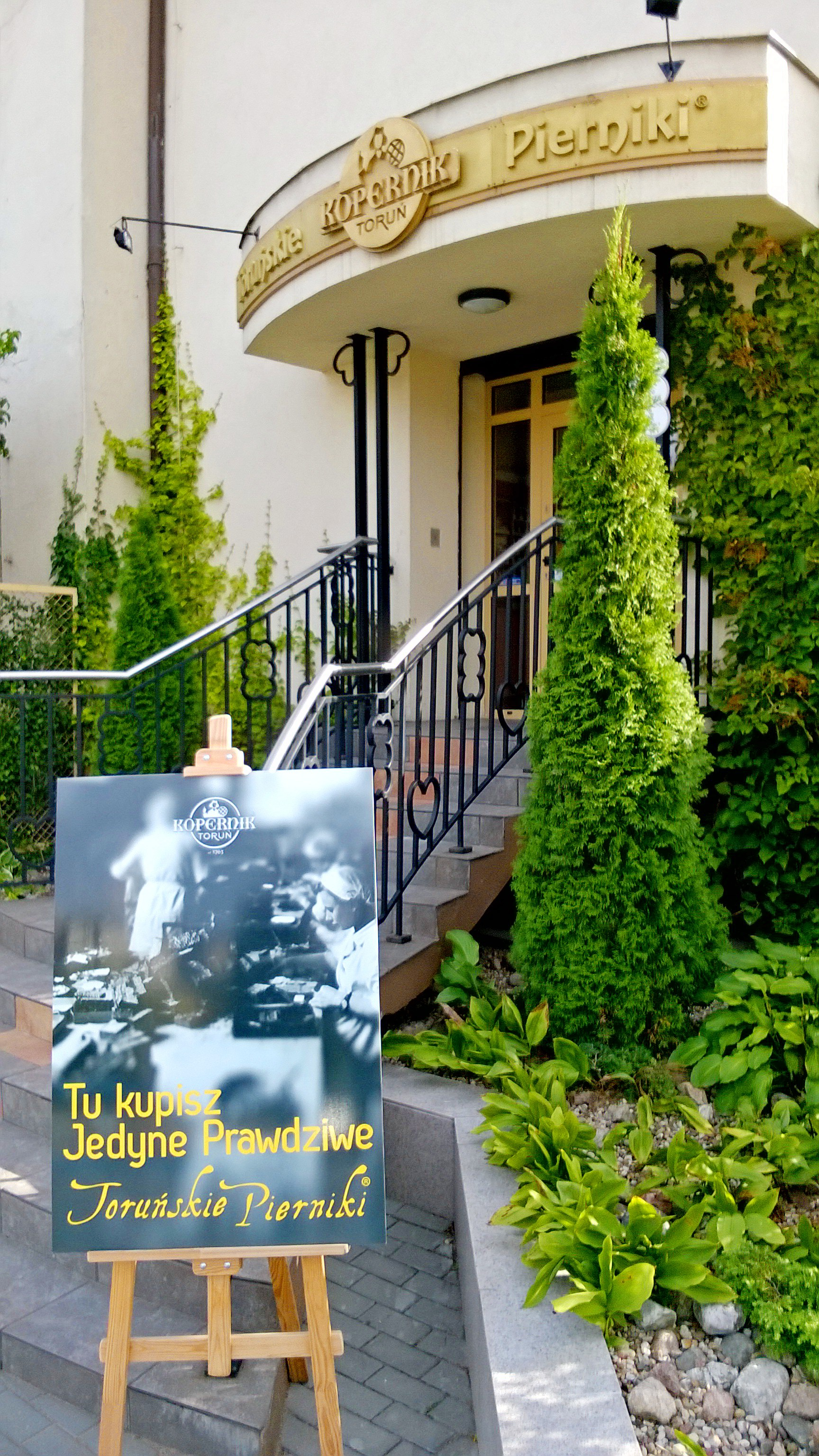 Sklep firmowy przy fabryce cukierniczej "Kopernik" w Toruniu